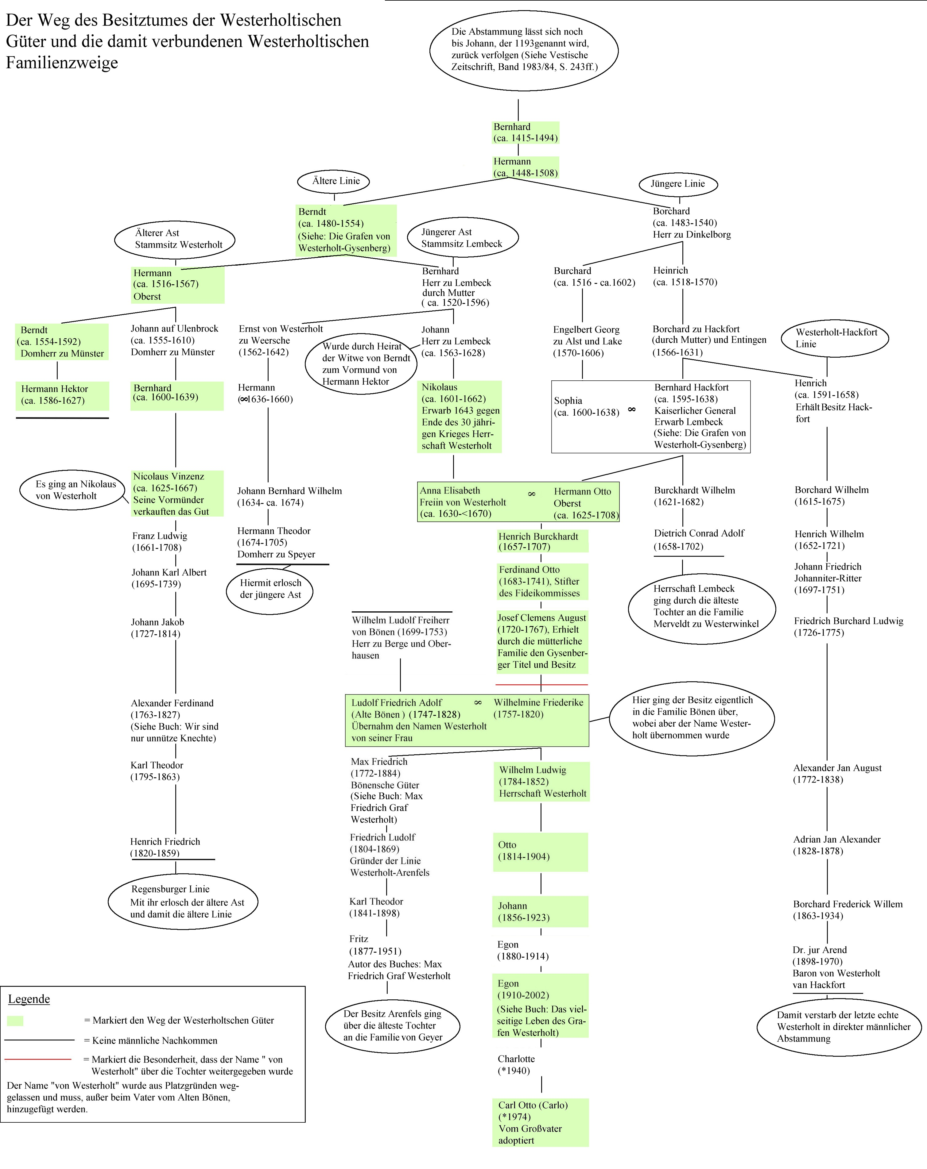 Ahentafel derer "von Westerholt". Wichtige Linien und wer jeweils die Herrschaft inne hatte. (Die Arenfelser Linie könnte noch akualisiert werden. Wer dazu mehr weiß, bitte melden!